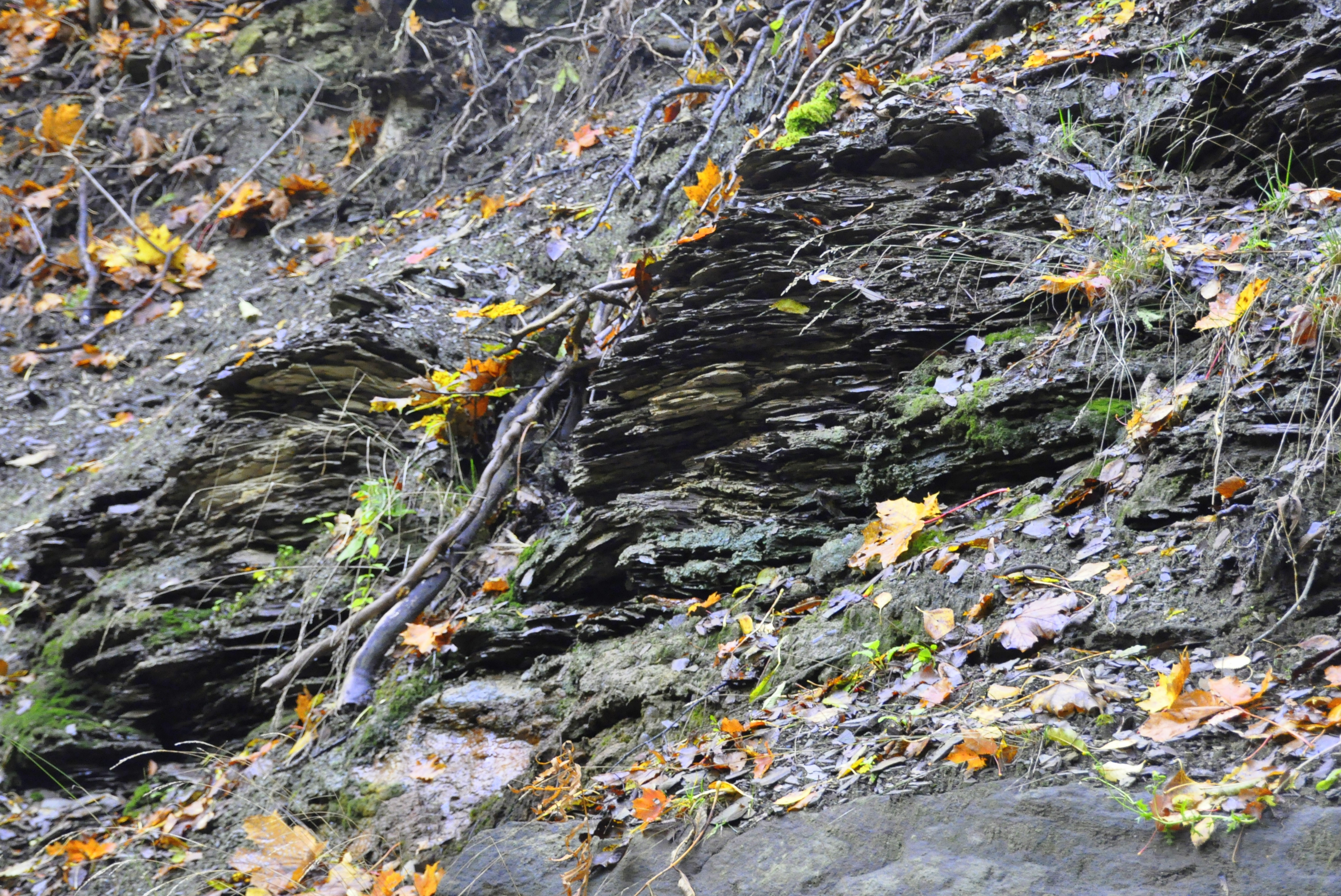 Suhkrumäe paljandis paiknev graptoliitargliit